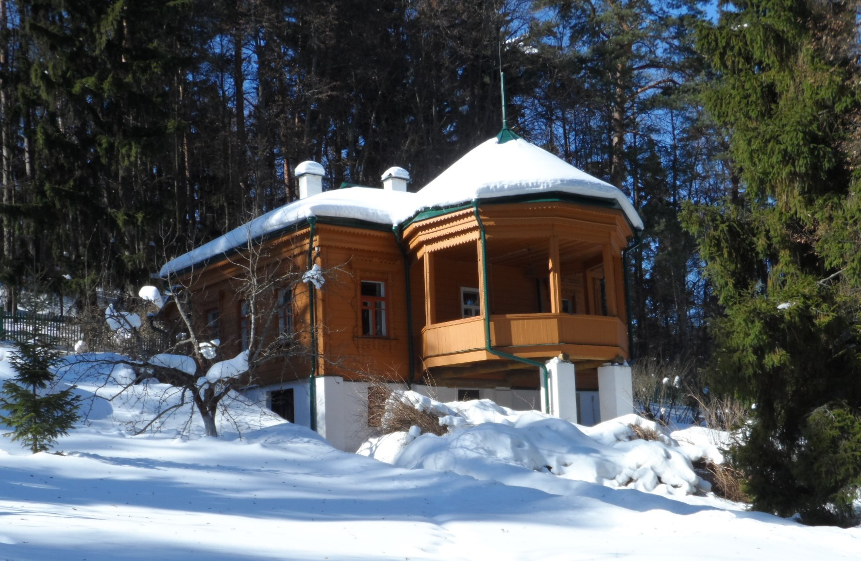 Дом-музей М.М. Пришвина (Москва и Московская область, Звенигород, деревня Дунино)